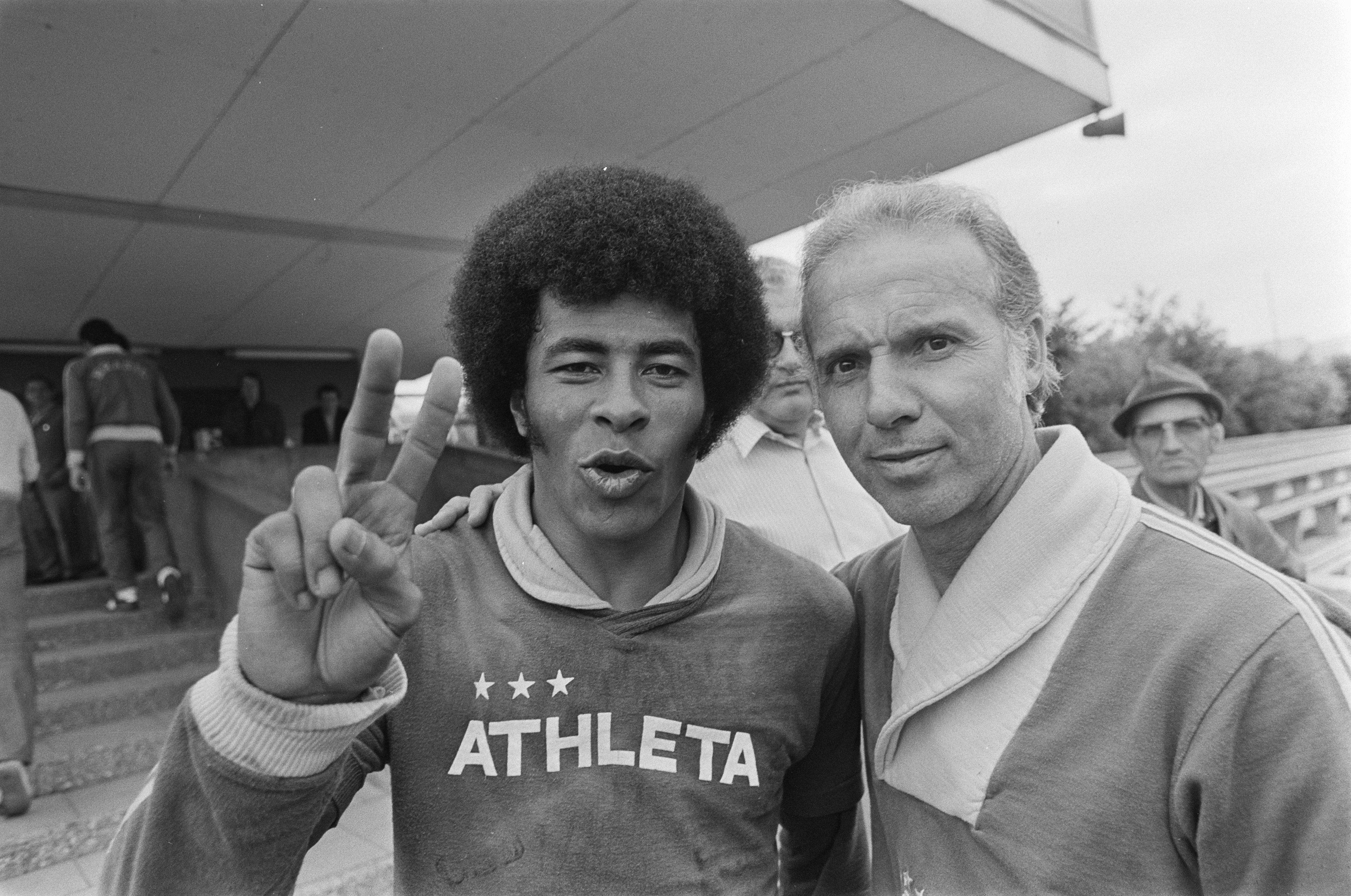 Collectie / Archief : Fotocollectie Anefo Reportage / Serie : [ onbekend ] Beschrijving : WK 74, training Brazilie; trainer Zagalo (r) en Jairzinko Datum : 1 juli 1974 Trefwoorden : sport, trainers, voetbal, wereldkampioenschappen Fotograaf : Mieremet, Rob / Anefo Auteursrechthebbende : Nationaal Archief Materiaalsoort : Negatief (zwart/wit) Nummer archiefinventaris : bekijk toegang 2.24.01.05 Bestanddeelnummer : 927-2949